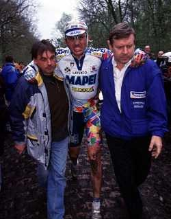 Blessure de Johan Museeuw